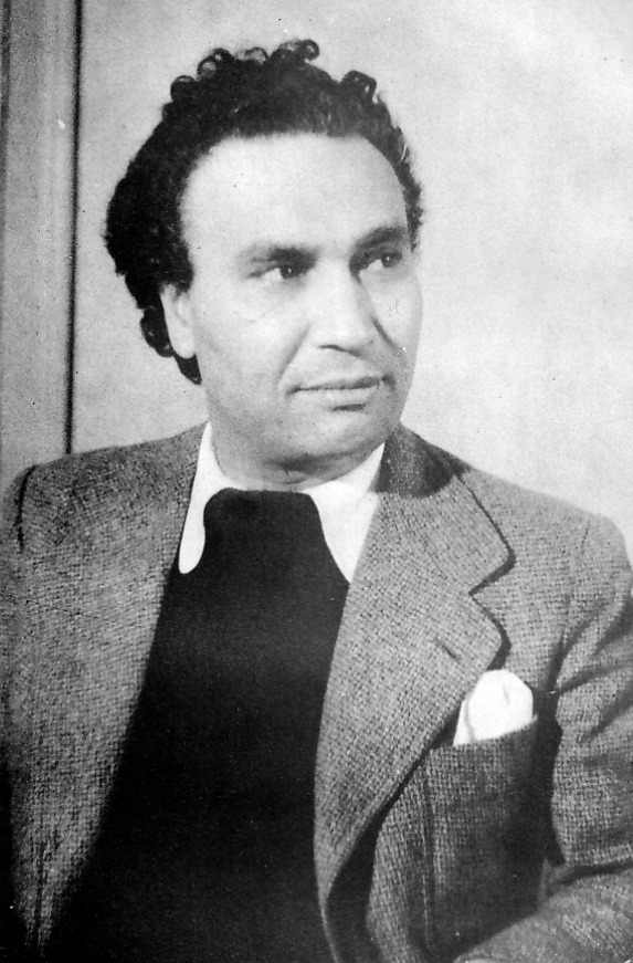 César Falcón (1892-1970) escritor y periodista peruano